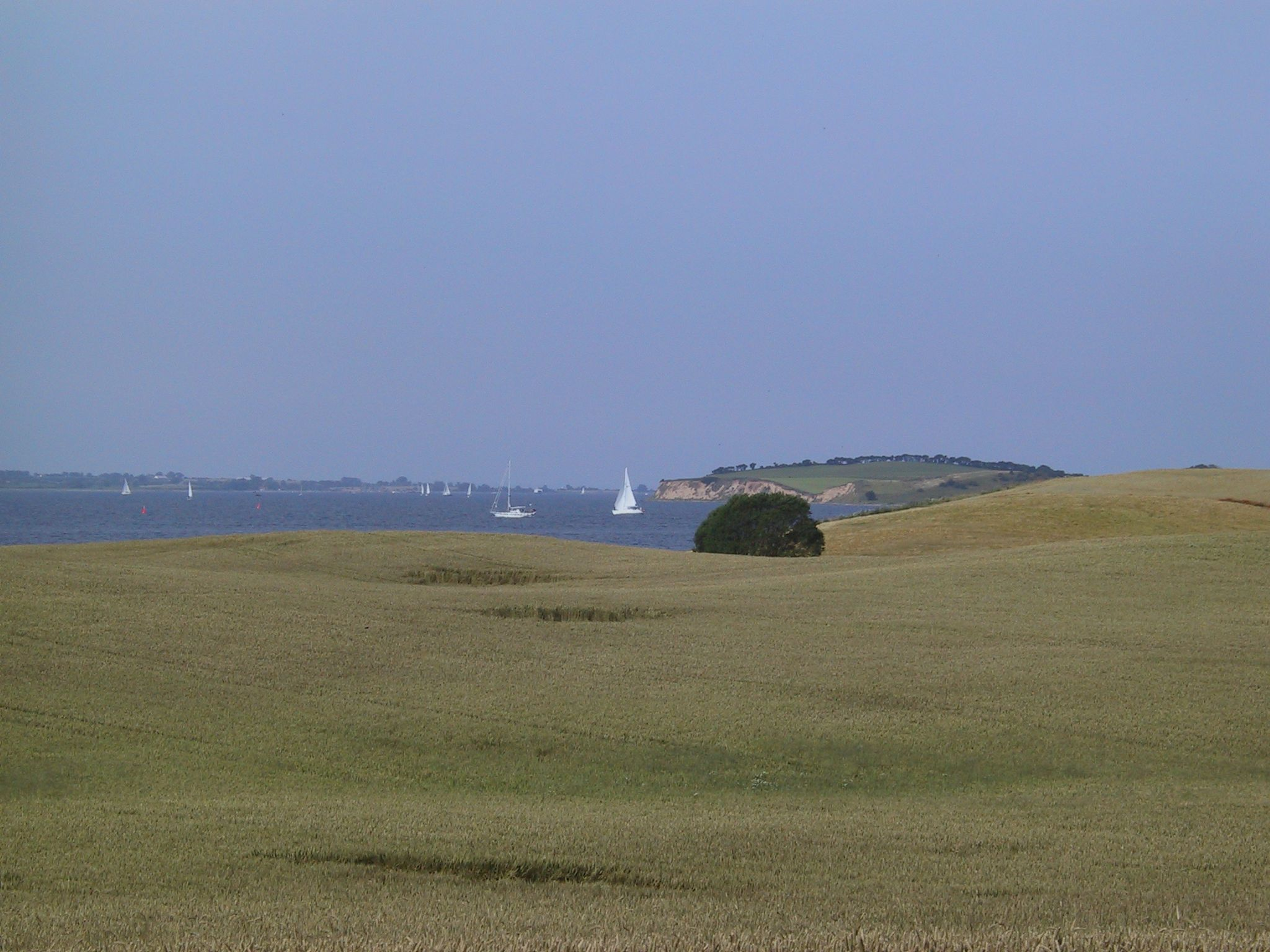 Bjørnø, island near Faaborg on Funen in Denmark